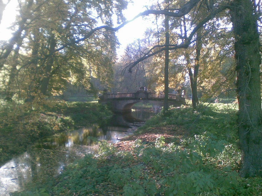 Posadowo, pałac